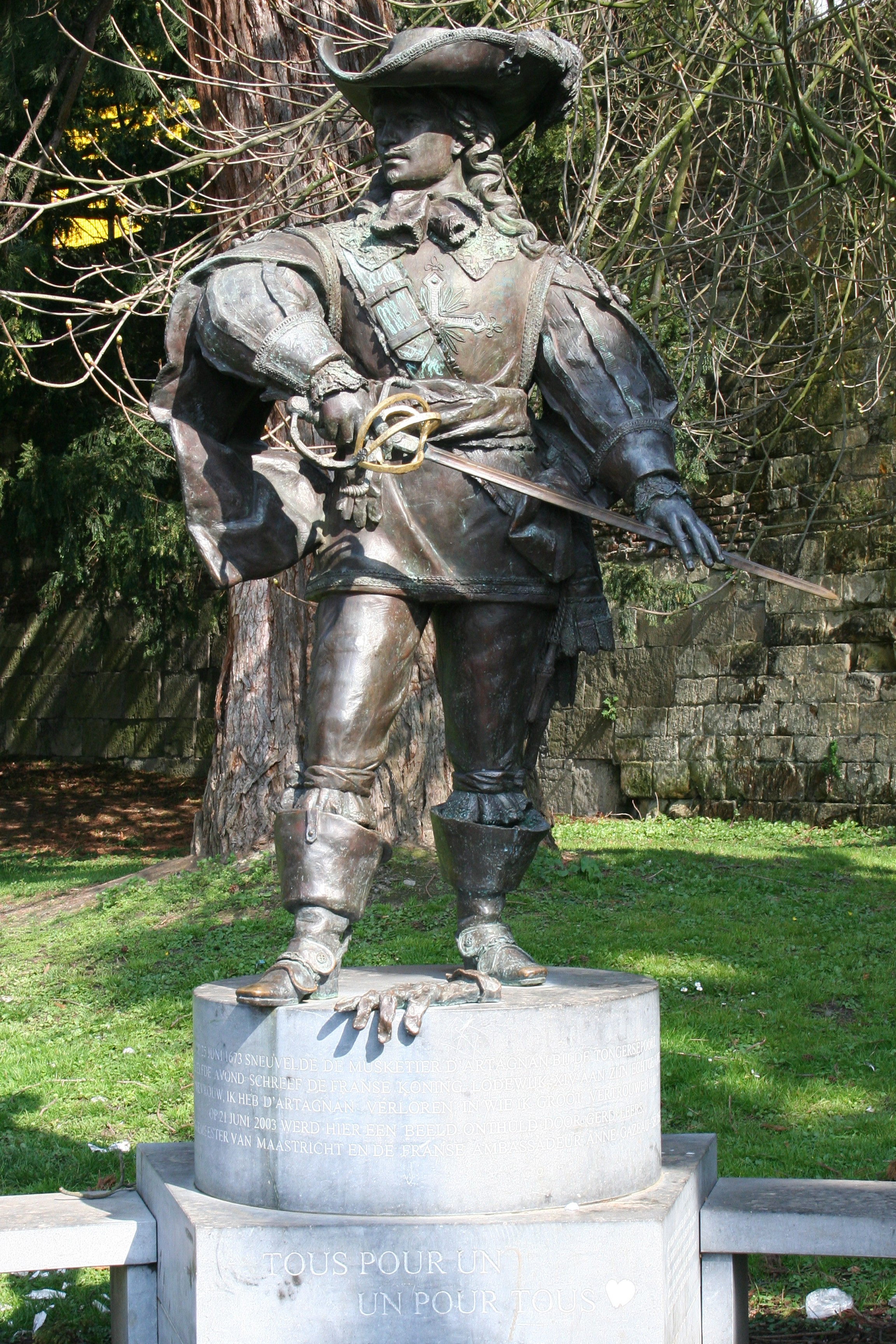 Limburgs: Beeld van d'Artagan (2003) in 't Aldenhofpark.